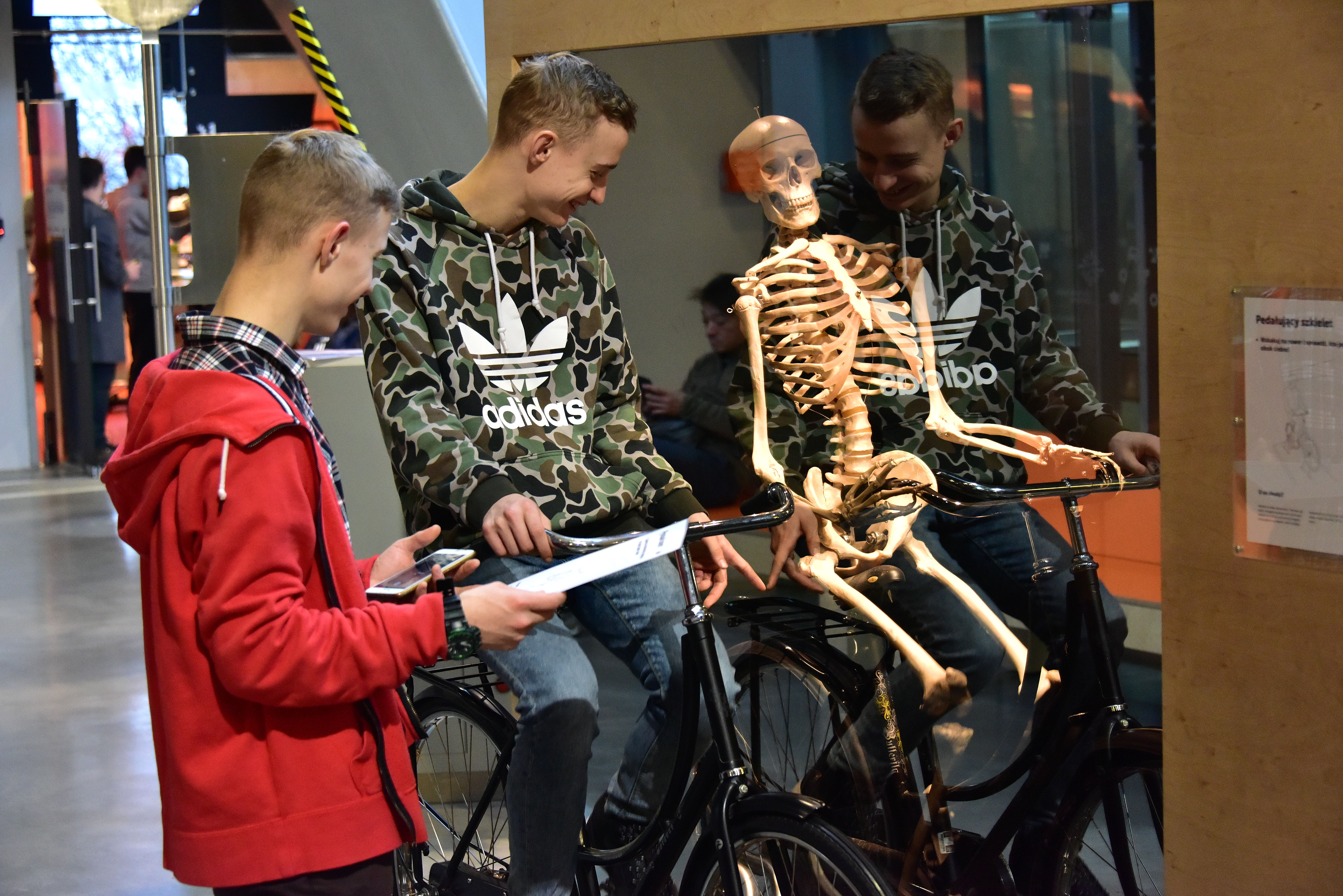 Centrum Nauki Kopernik w Warszawie. Instalacja Pedałujący szkielet